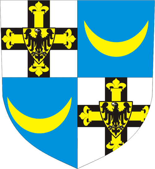 Teutonic Order - Coat of Arms of the Grandmaster Wappen des Hochmeisters des Deutschen Ordens Karl von Trier